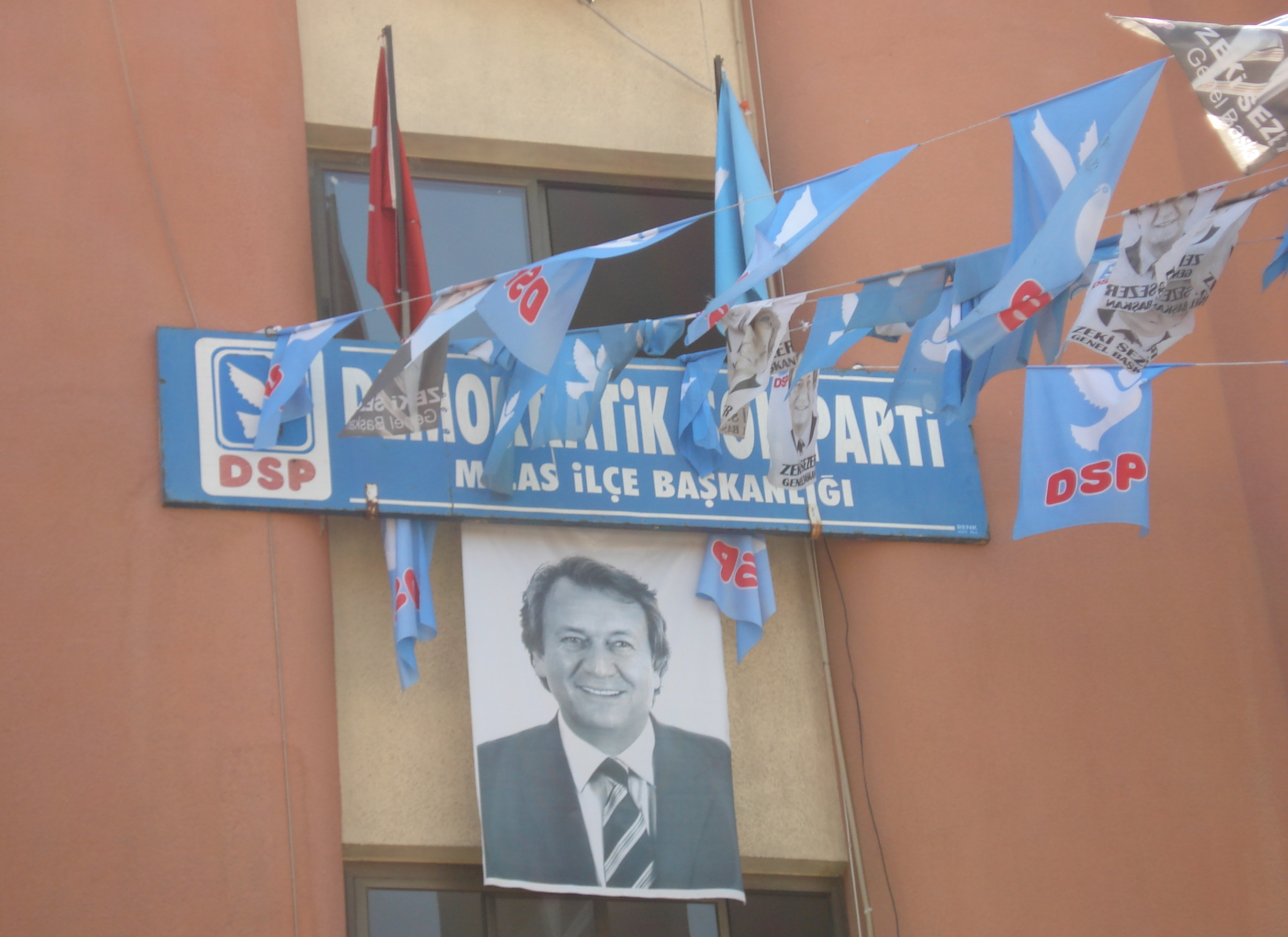 Milas, Muğla